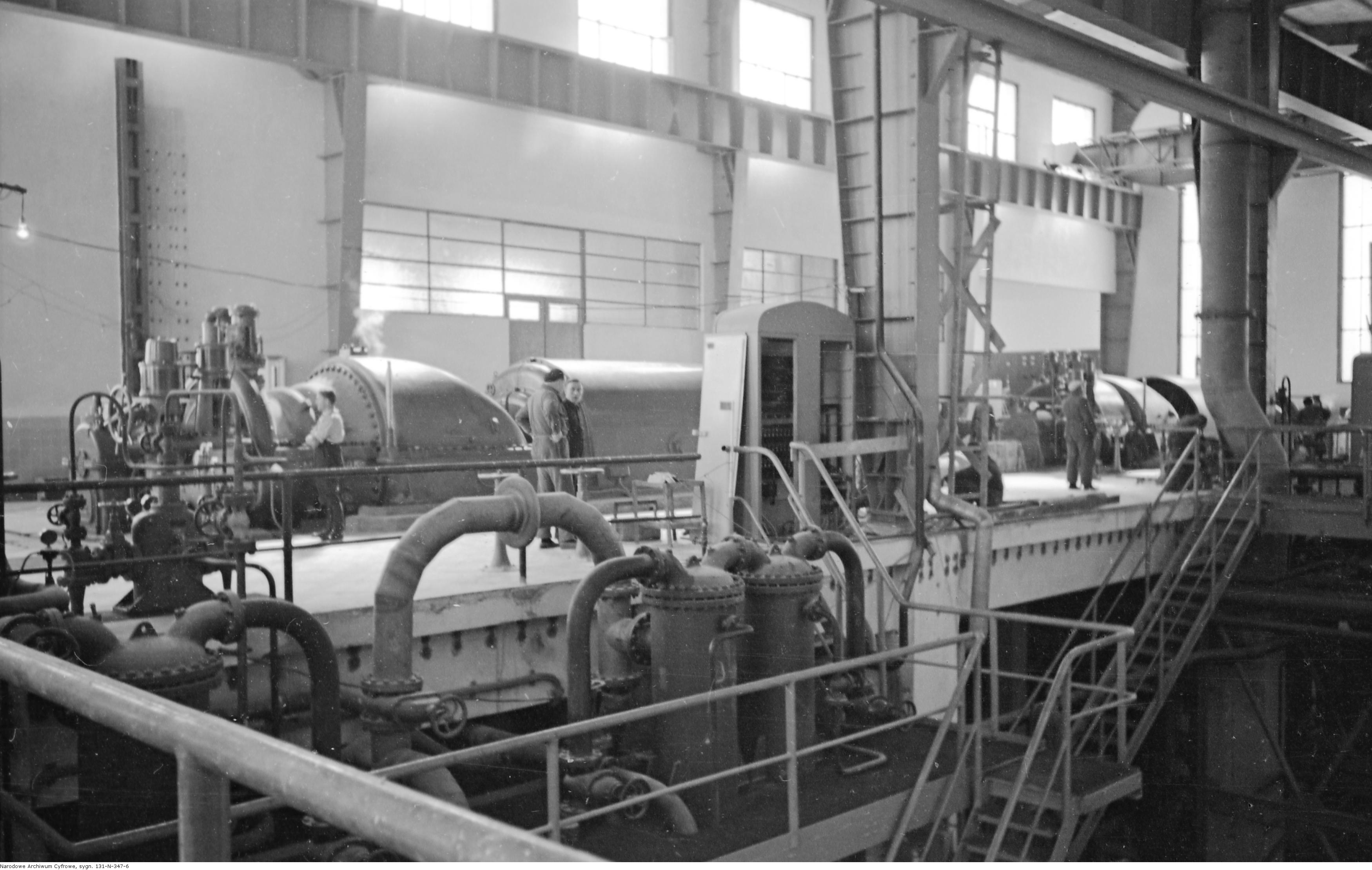 Elektrownia.